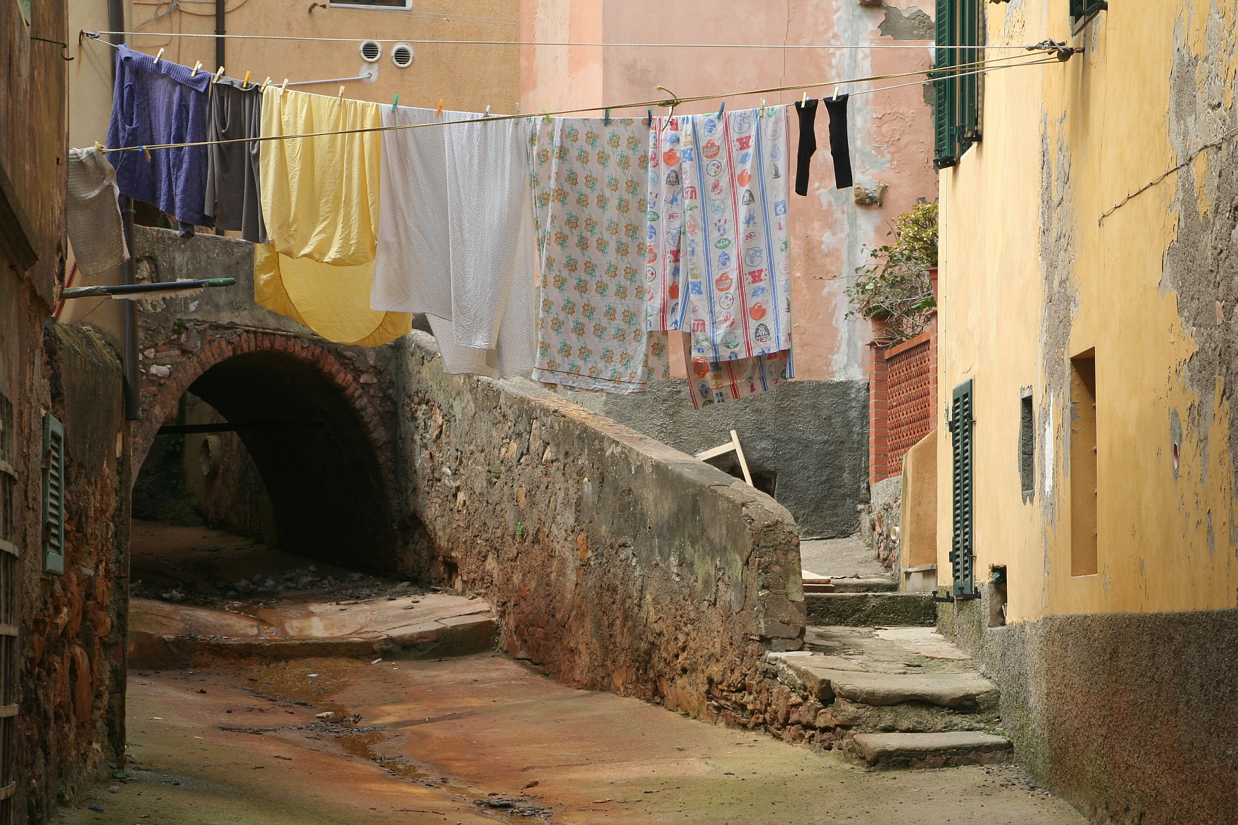 Rio Marina, Livorno, Toscana, Italia